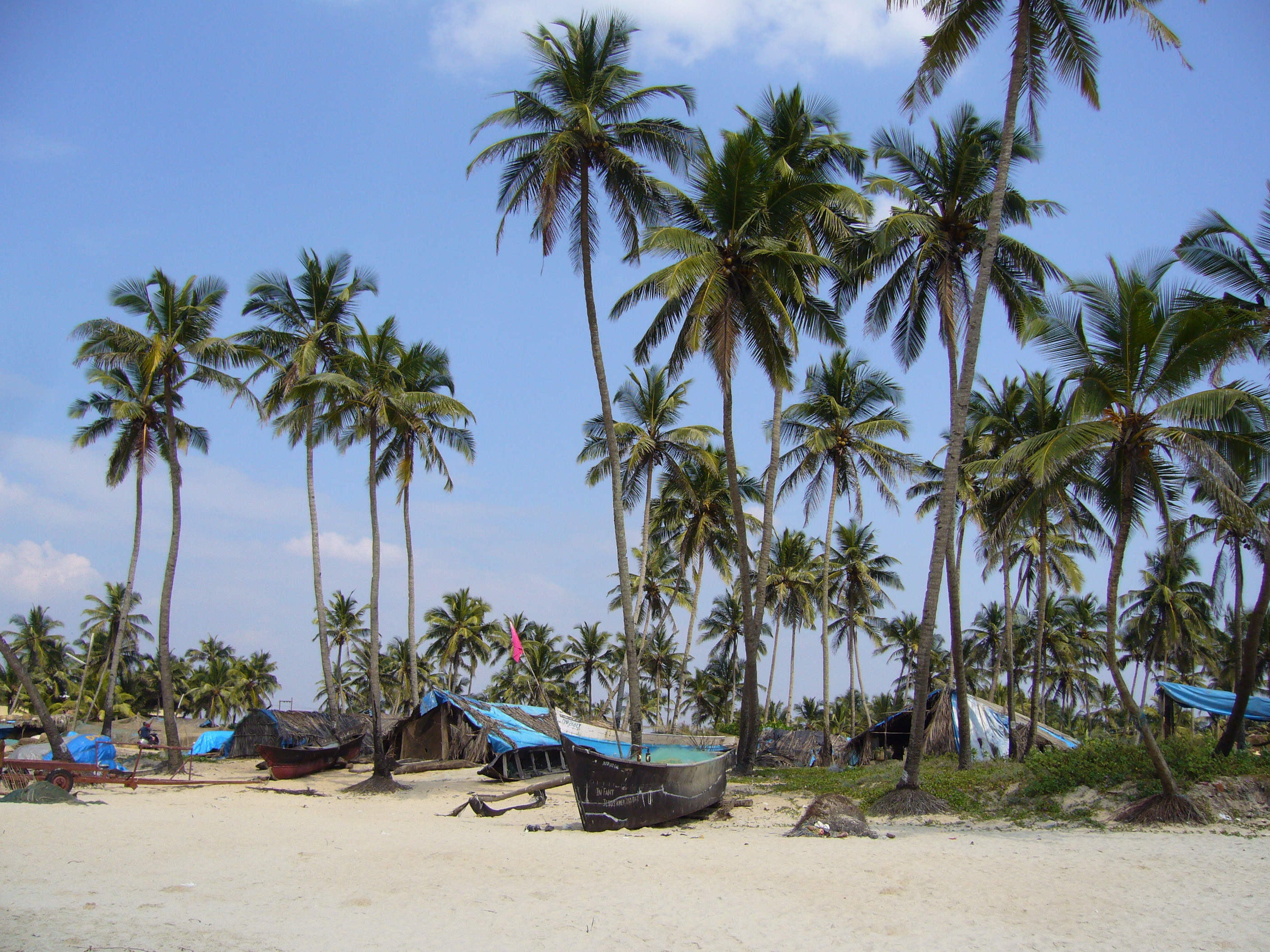 GOA Colva Beach